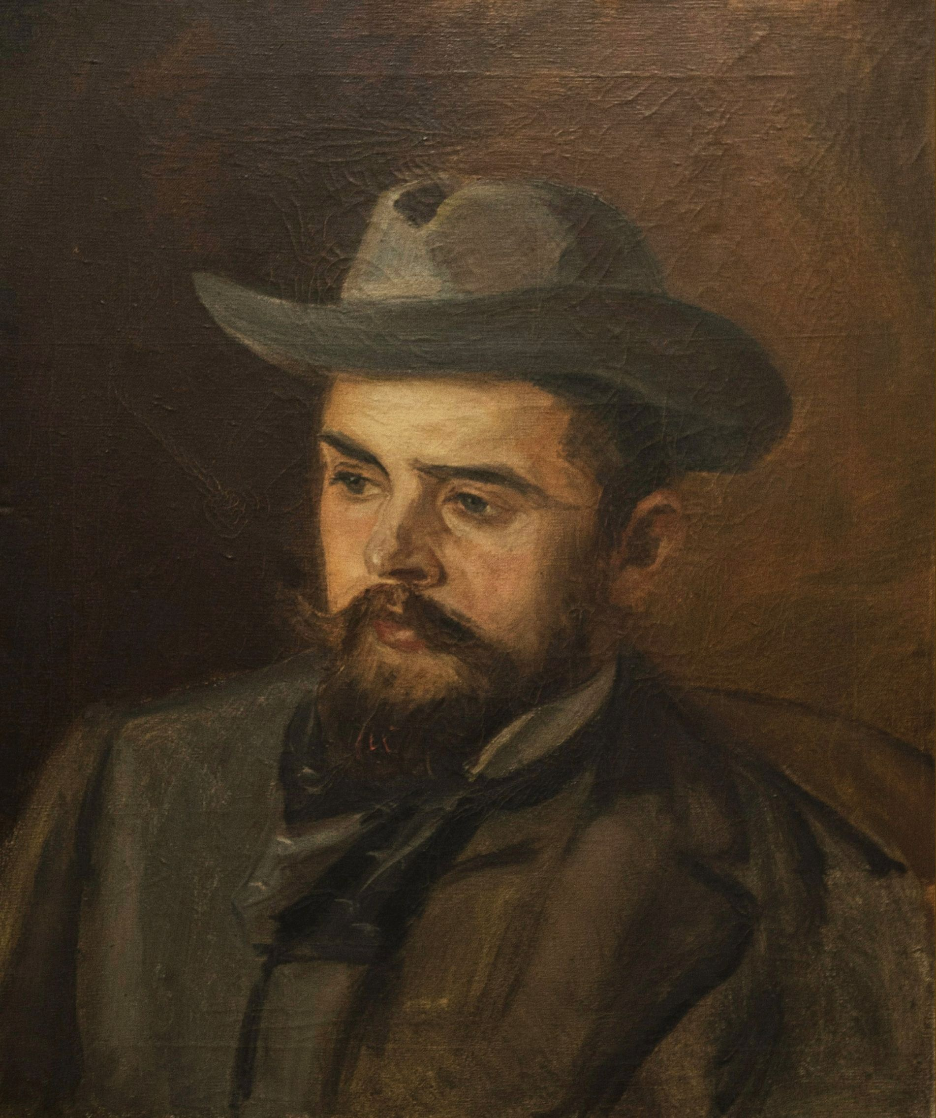 Kazimierz Pochwalski - portret Władysława Sadłowskiego (1895)